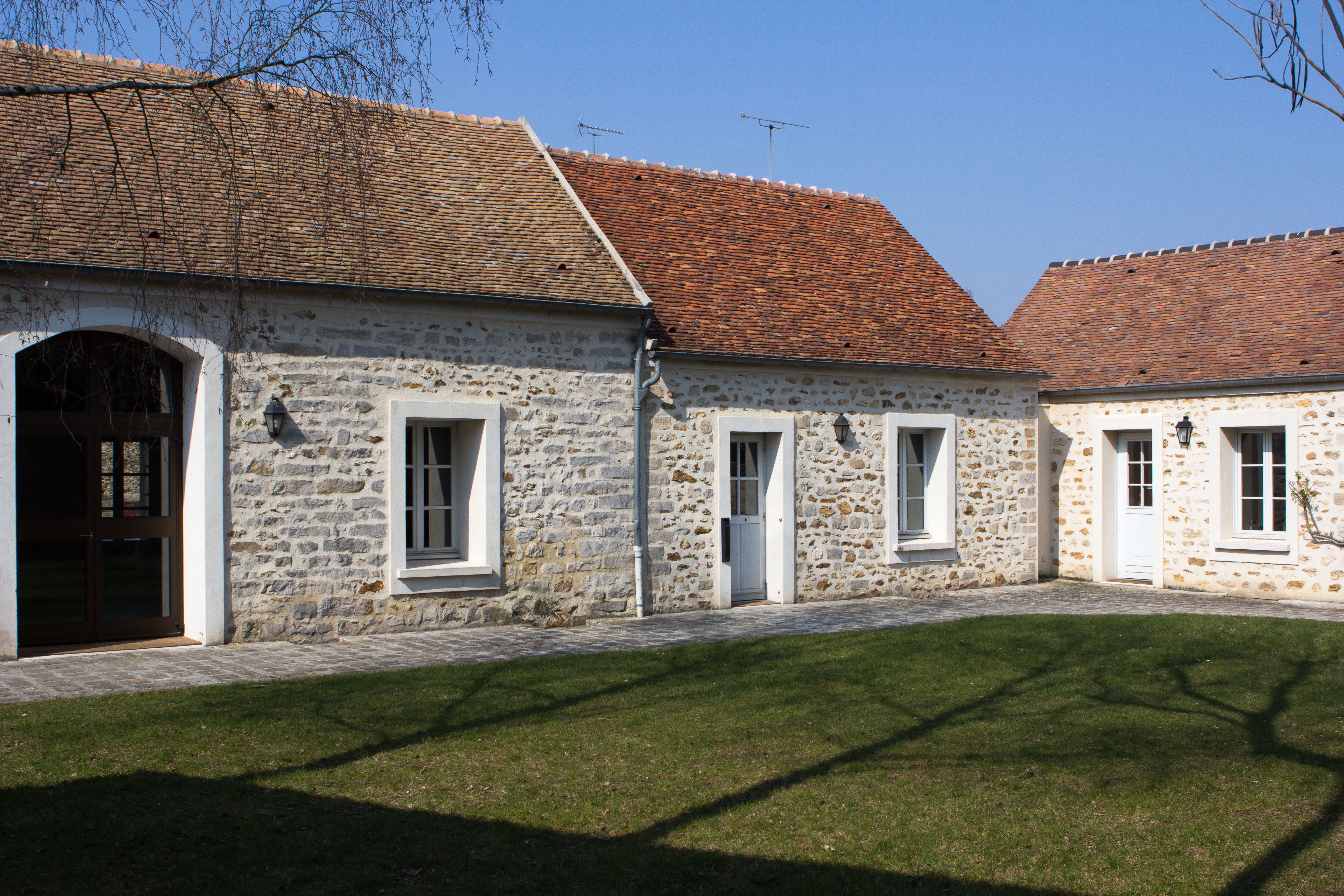 Ecole de Fleury-en-Bière (Fleury-en-Bière, Seine-et-Marne, France)